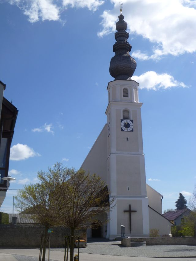 Kath. Pfarrkirche Mariä Opferung und Kirchhof mit Ummauerung